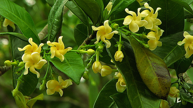 Tabernaemontana salzmanni A. DC.